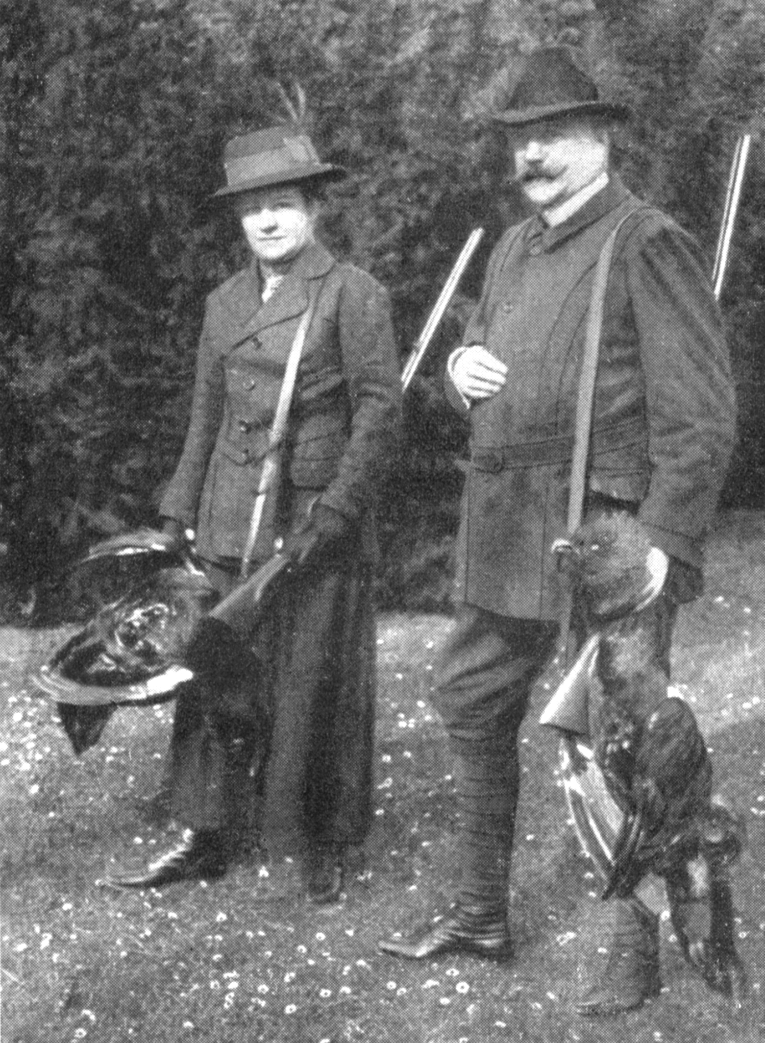 Ernst von Jagow und seine Ehefrau Helene, geb. v. Enckevort, bei der Jagdausübung * Datum: 24.04.1915 * Urheber: Dolly Maxa von Plessen, geb. v. Puttkamer * Quelle: privates Fotoarchiv der eigenen (mütterlichen) Familie * Hinweis: das Foto stammt aus dem Nachlass meiner verstorbenen Großmutter Dolly Maxa v. Plessen, geb. v. Puttkamer, die das Foto ihrer Mutter Helene (geb. v. Enckevort) und ihres Stiefvaters Ernst v. Jagow gem. fam. Überlieferung selber aufgenommen hatte